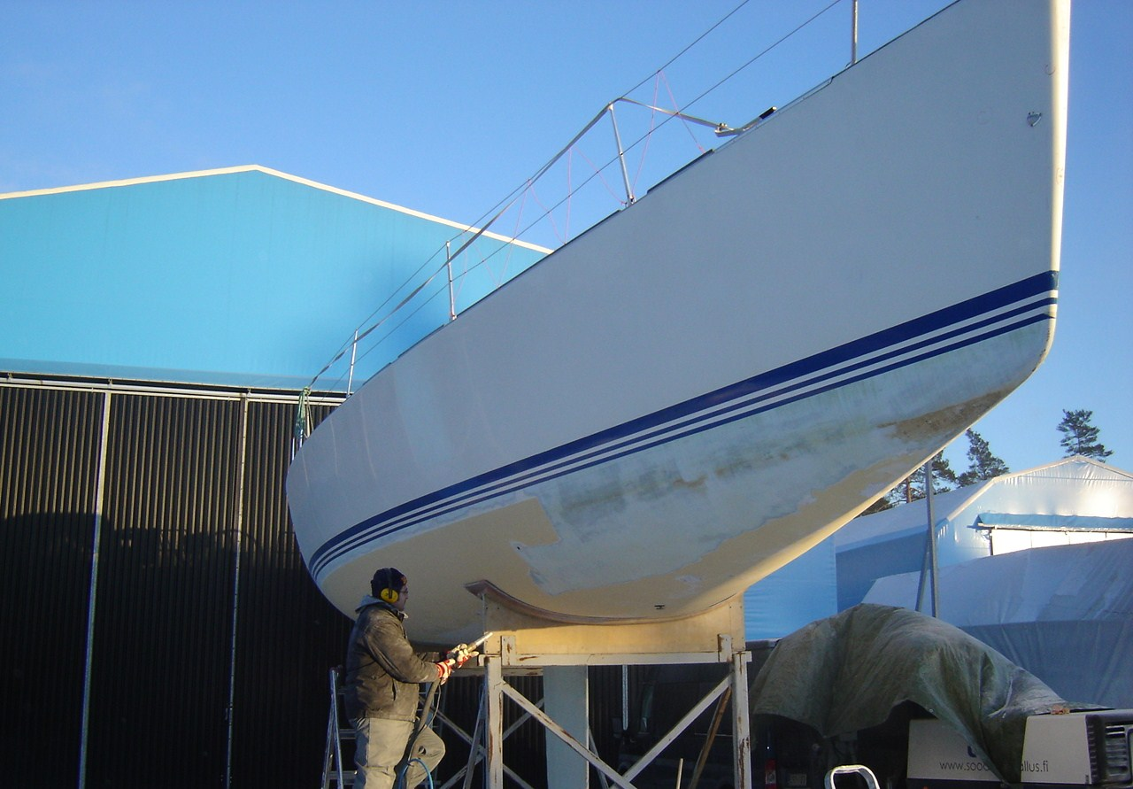 Inkoo, Suomen Soodapuhallus Oy töissä